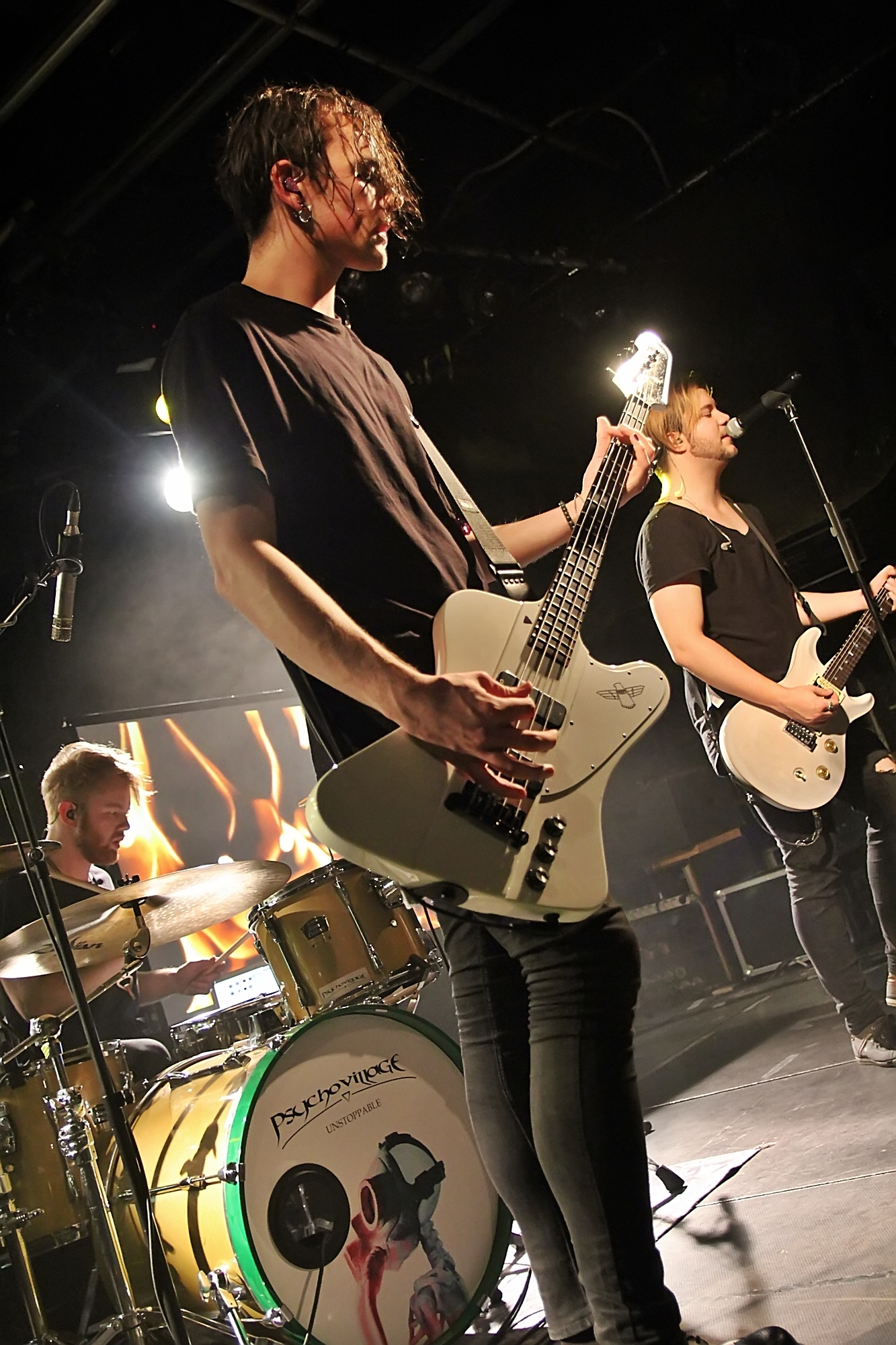 PSYCHO VILLAGE in Nürnberg 2020